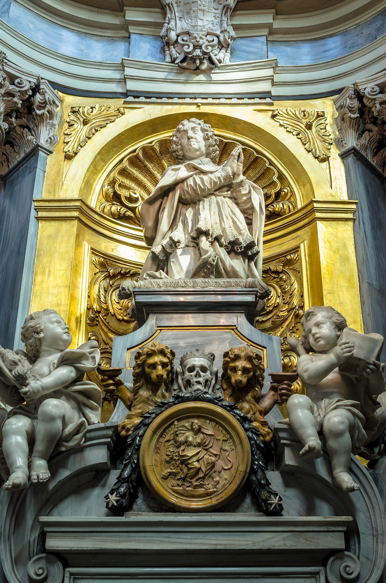 Katedra św. Jana Chrzciciela we Wrocławiu - kaplica św. Elżbiety, fragment grobowca Friedricha von Hessen